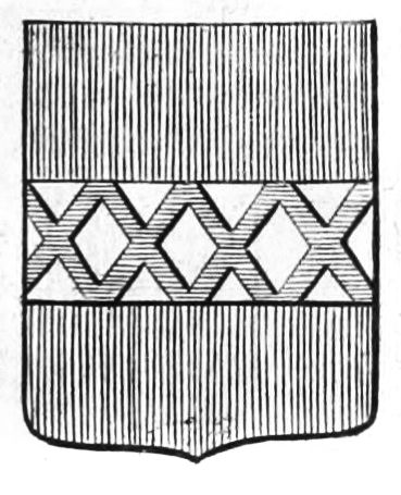 Quartiers généalogiques des familles nobles des Pays-Bas/ van Steelant